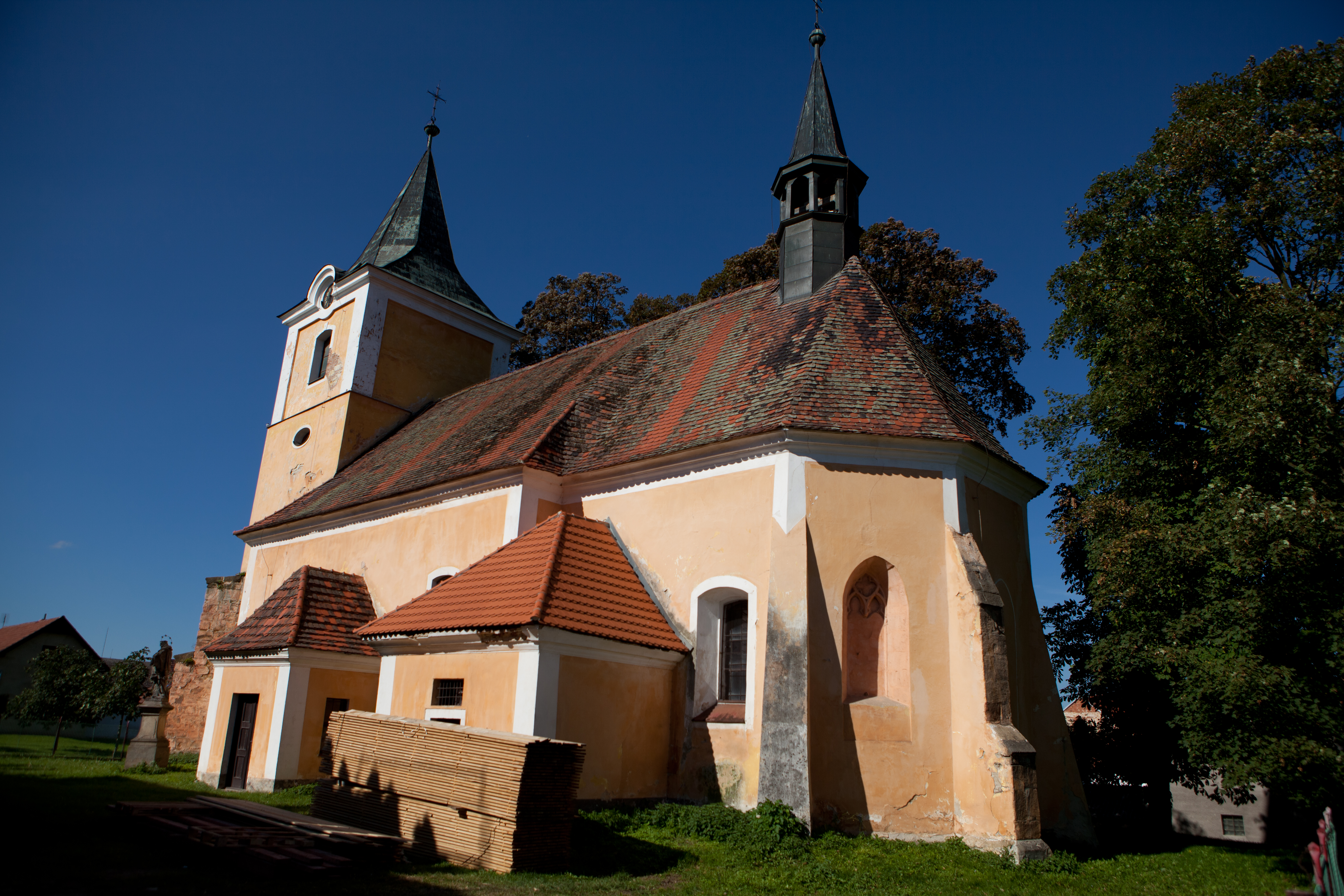 Kostel sv. Petra a Pavla (Řevničov), náves, Řevničov